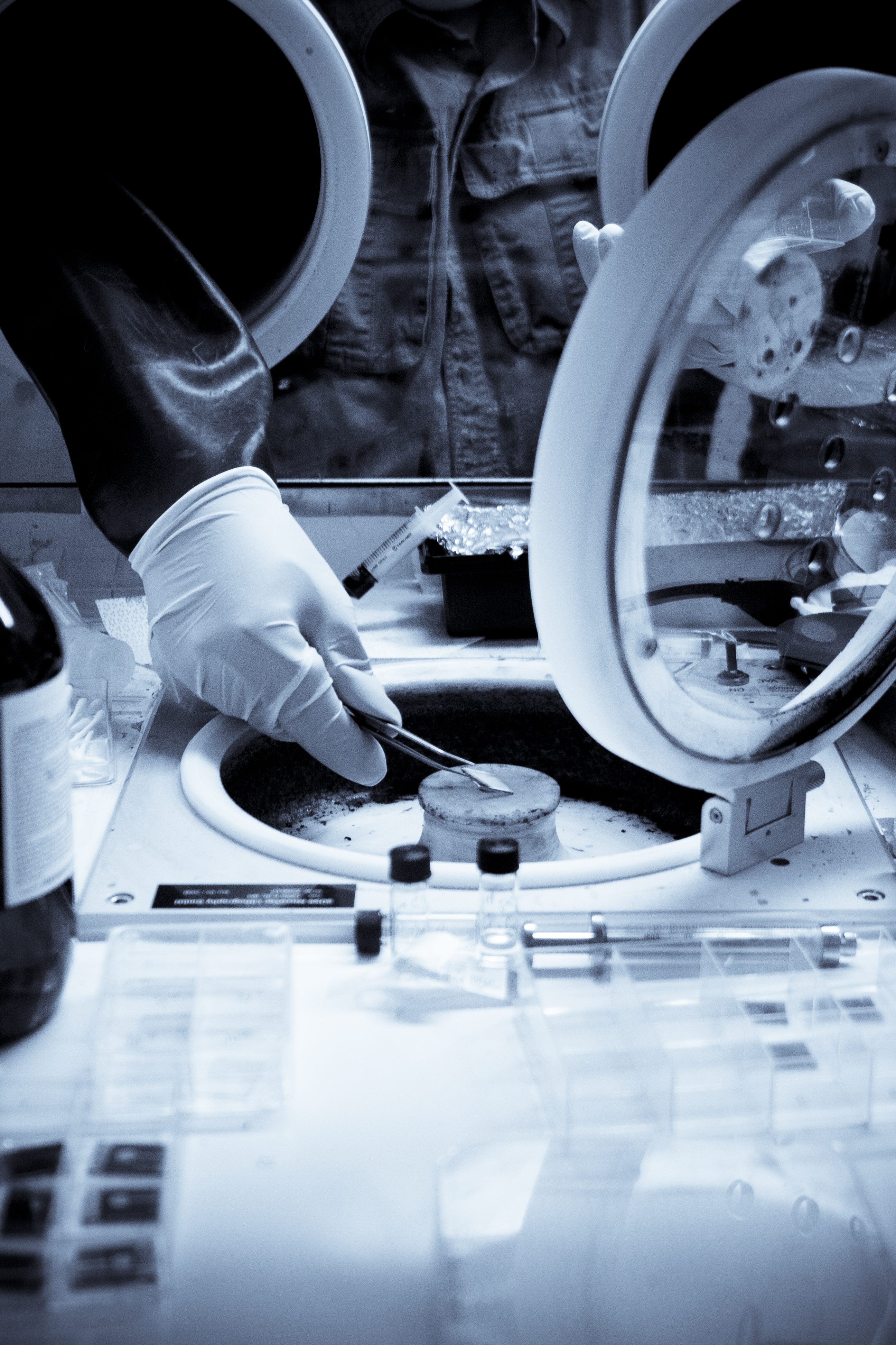 École polytechnique, modal électronique grandes surfaces au laboratoire LPICM-Orgatech (Laboratoire de Physique des Interfaces et Couches Minces).